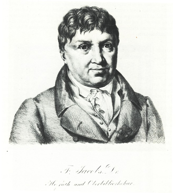 Portrait des Philologen Friedrich Jacobs.